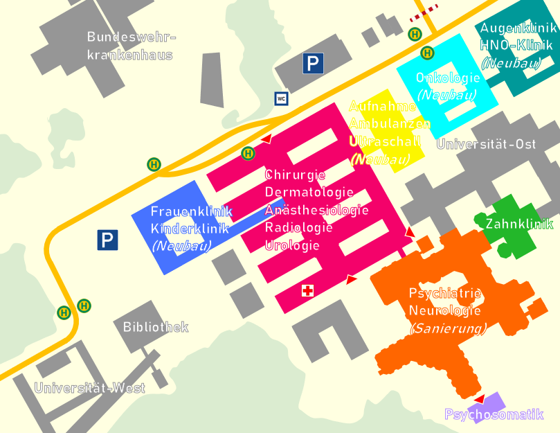 Derzeitige Planungen (Stand: November 2017) für die Zusammenfassung der Kliniken des Universitätsklinikums Ulm auf den Campus Oberer Eselsberg